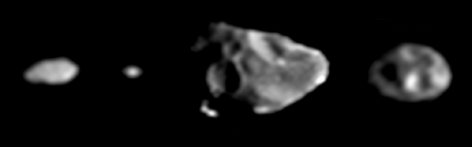 Composición fotográfica de los cuatro satélites menores interiores de Júpiter. Las fotografías fueron tomadas por la sonda Galileo de la NASA.